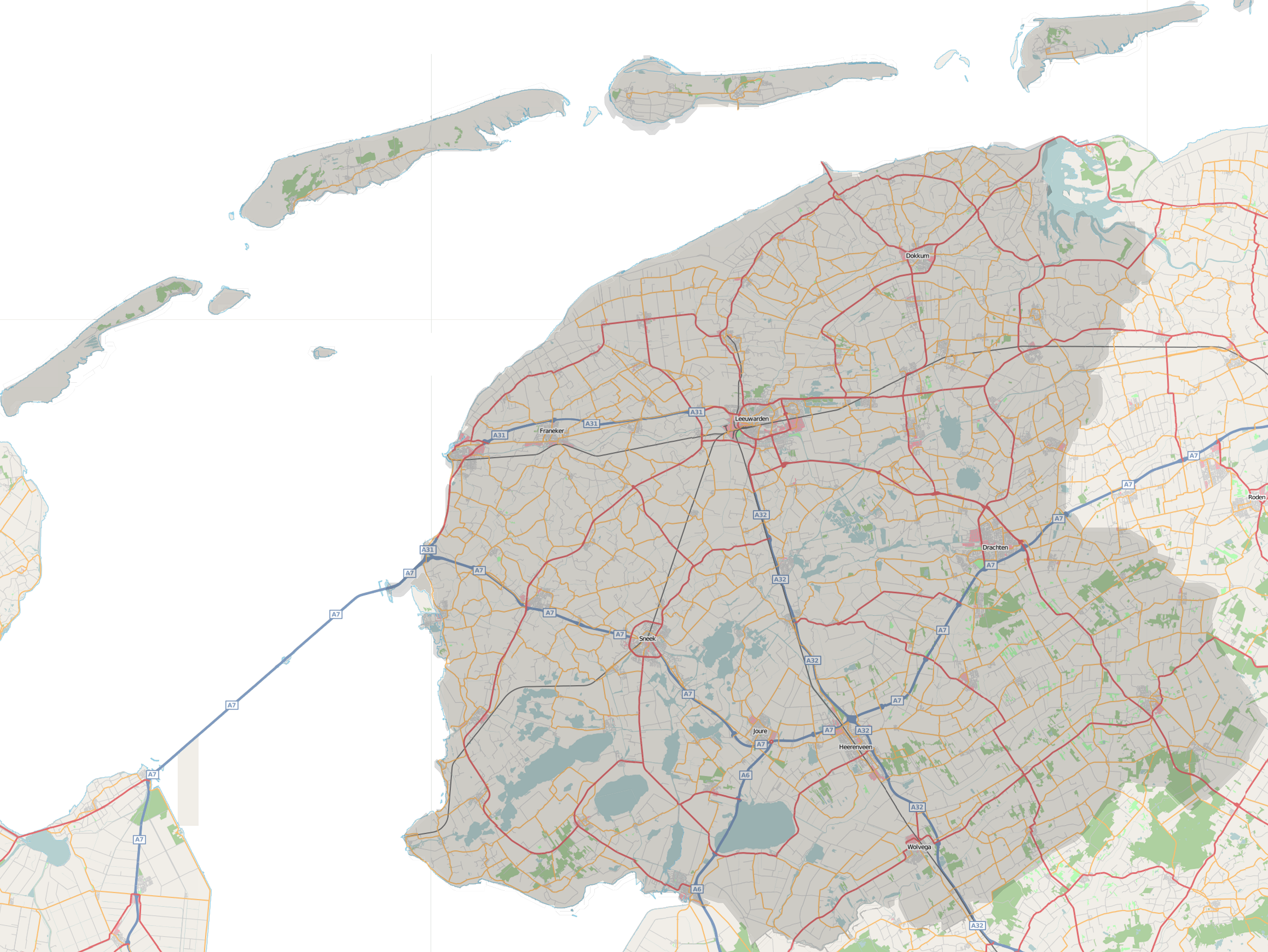 "Friesland"